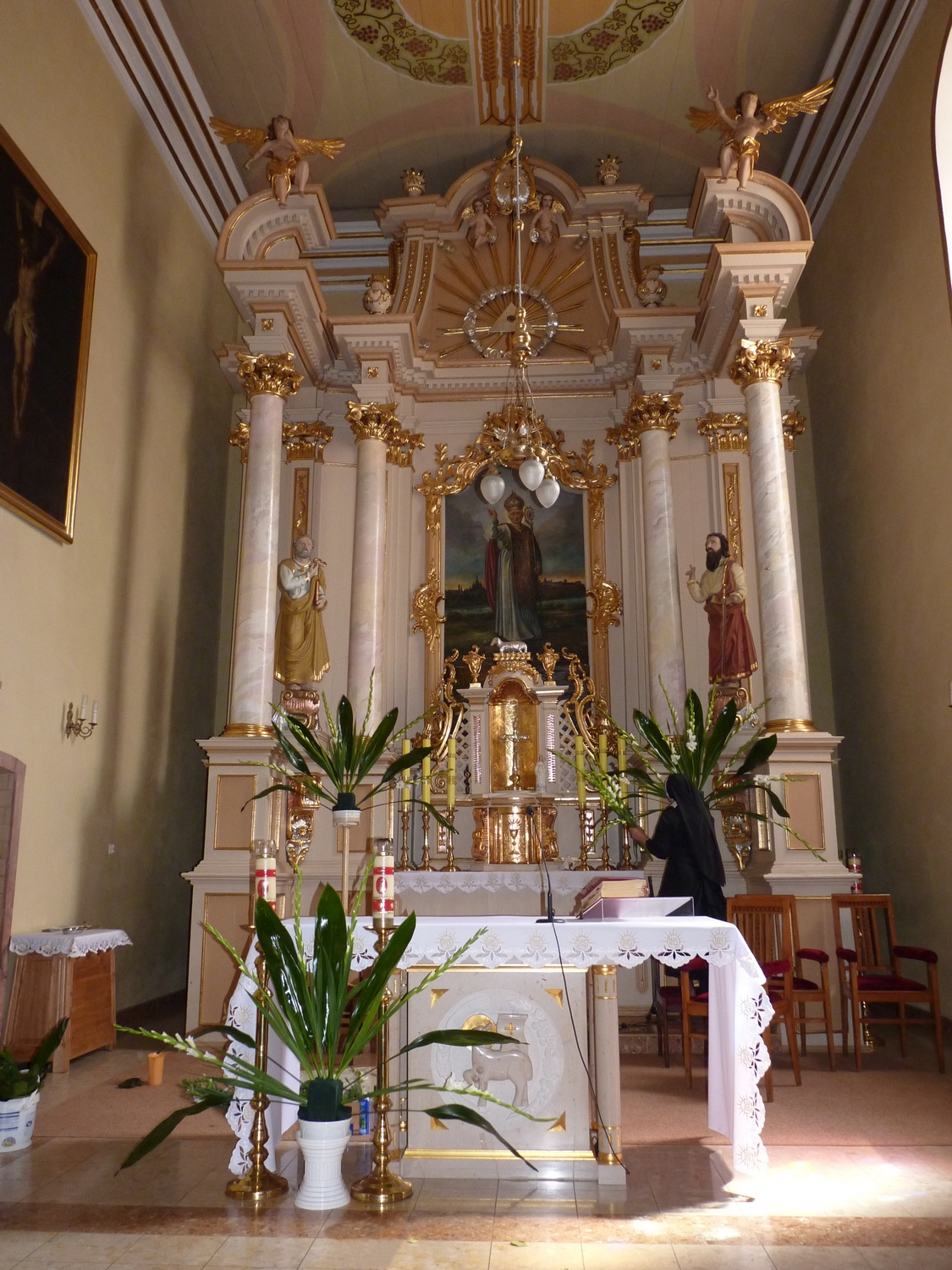 Ołtarz główny w kościele św. Stanisława Biskupa i Męczennika